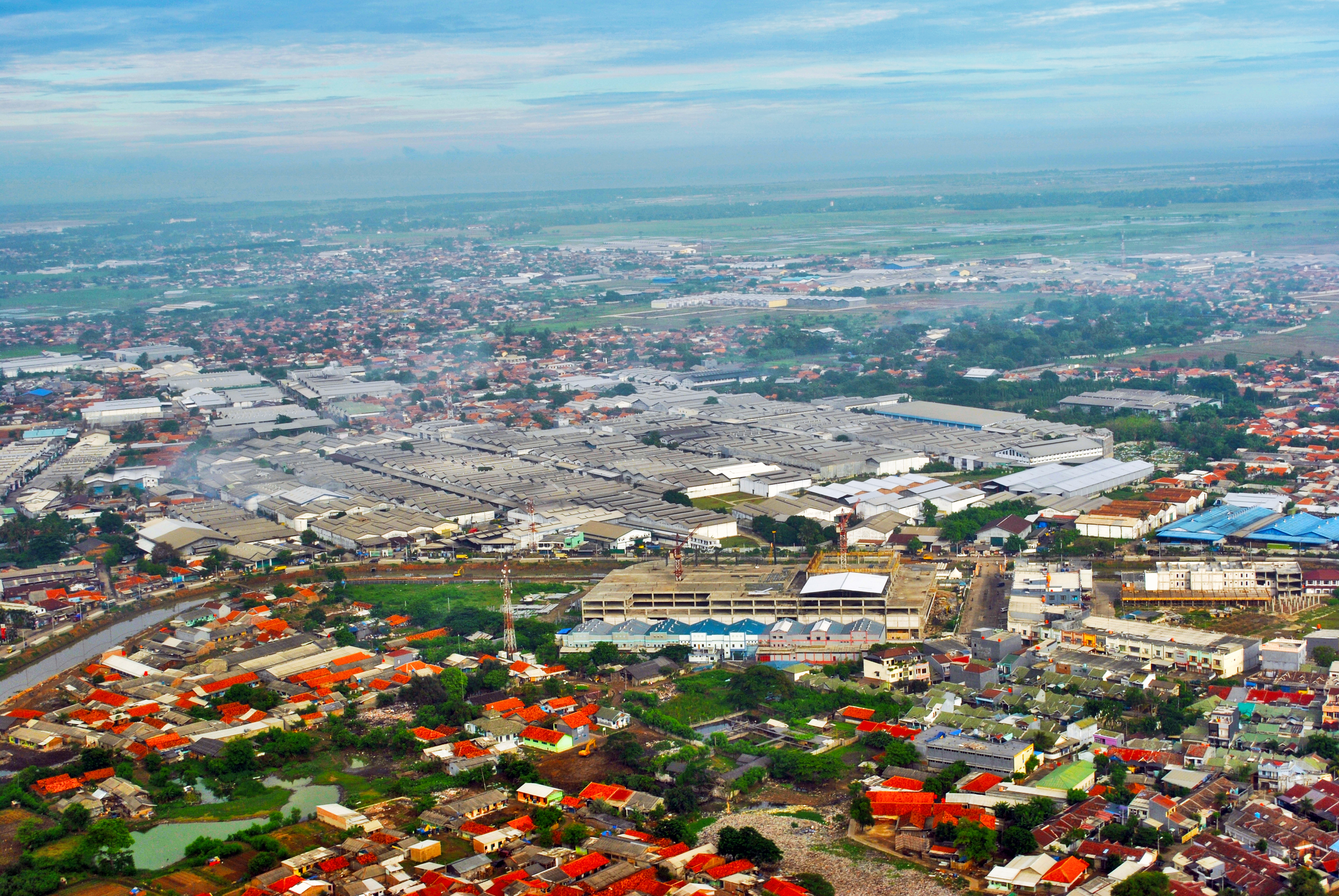 Gudang